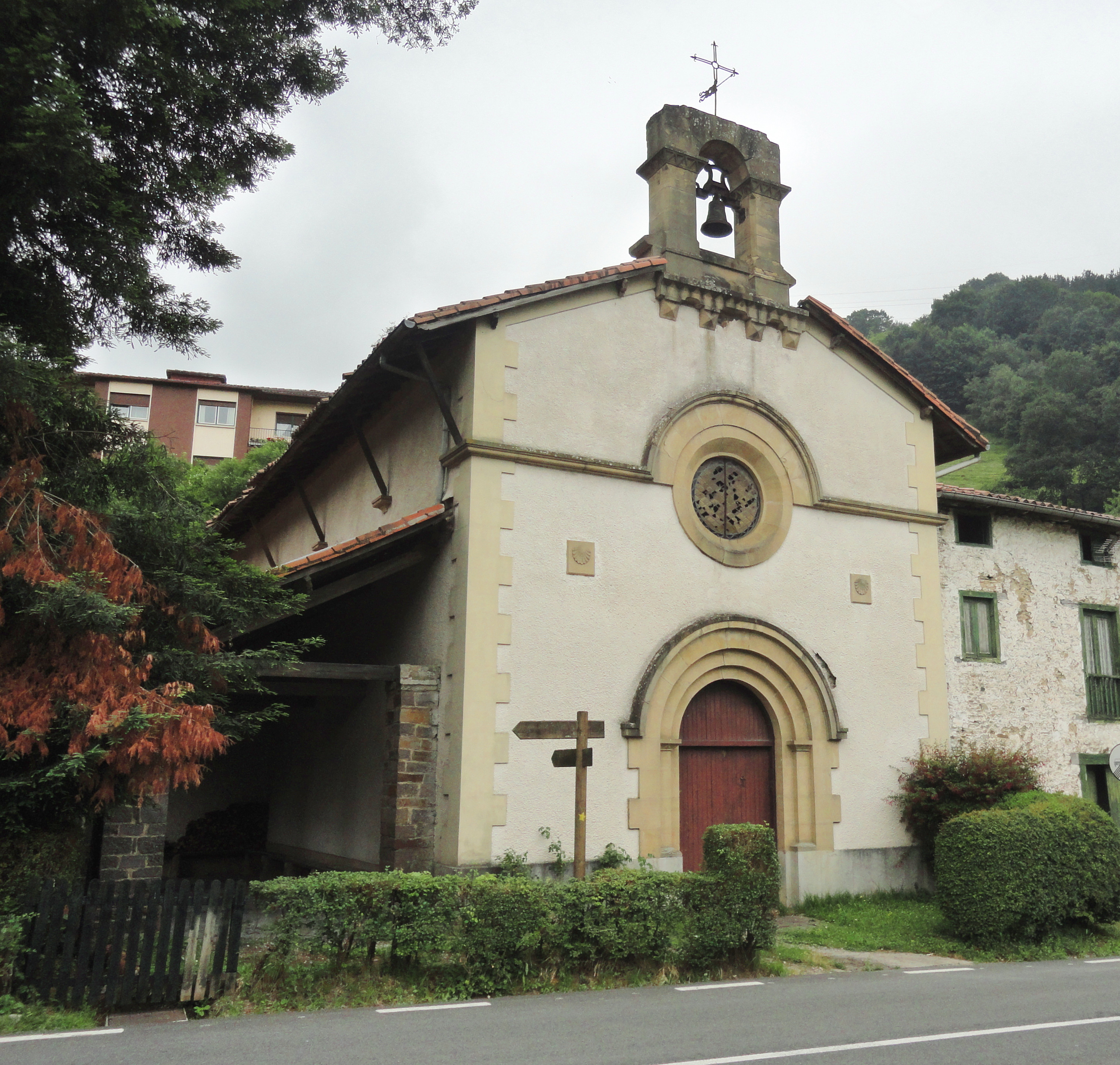 San Juan ermita - Itsasondo